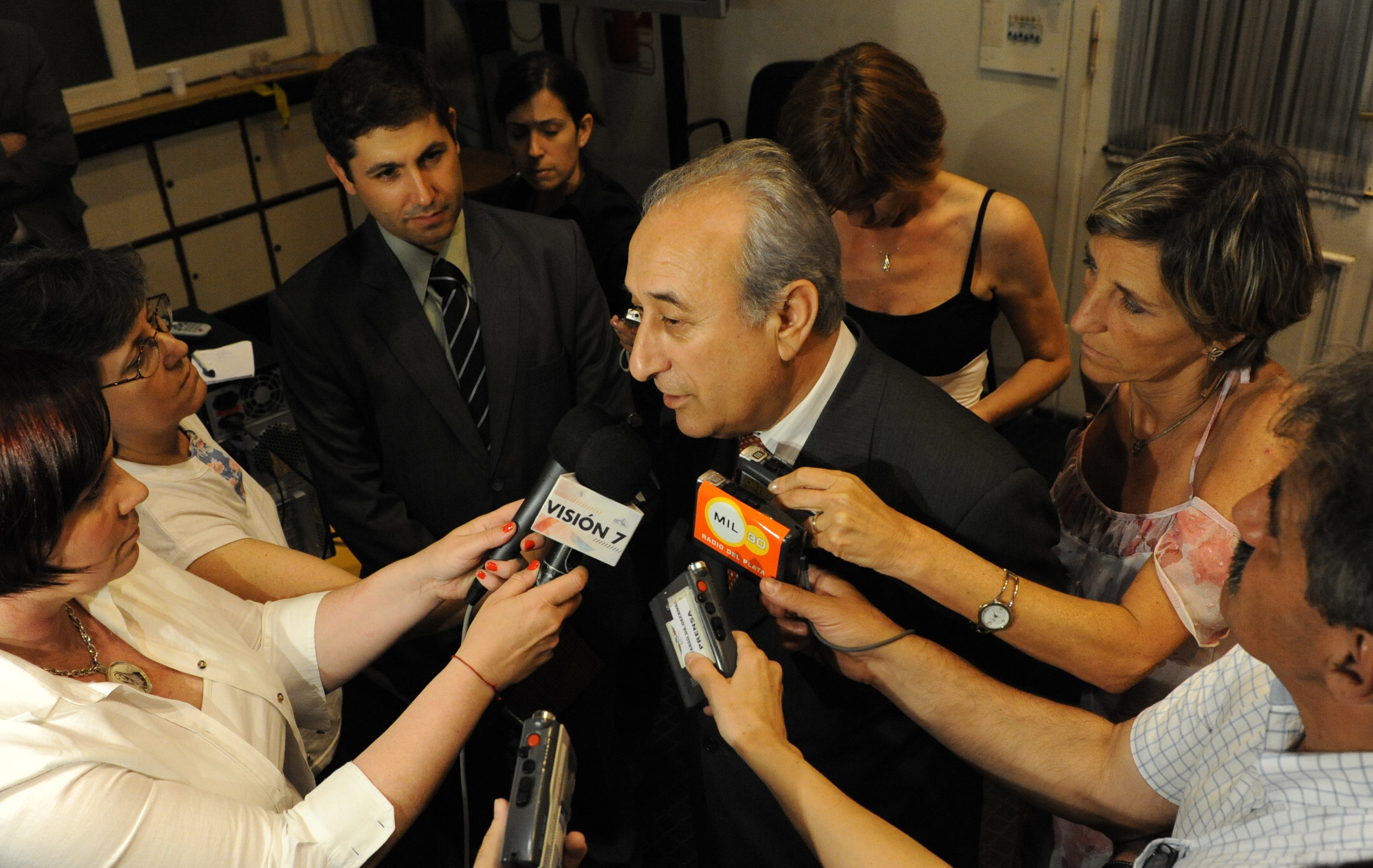 El nuevo ministro de defensa argentino, Arturo Puricelli.